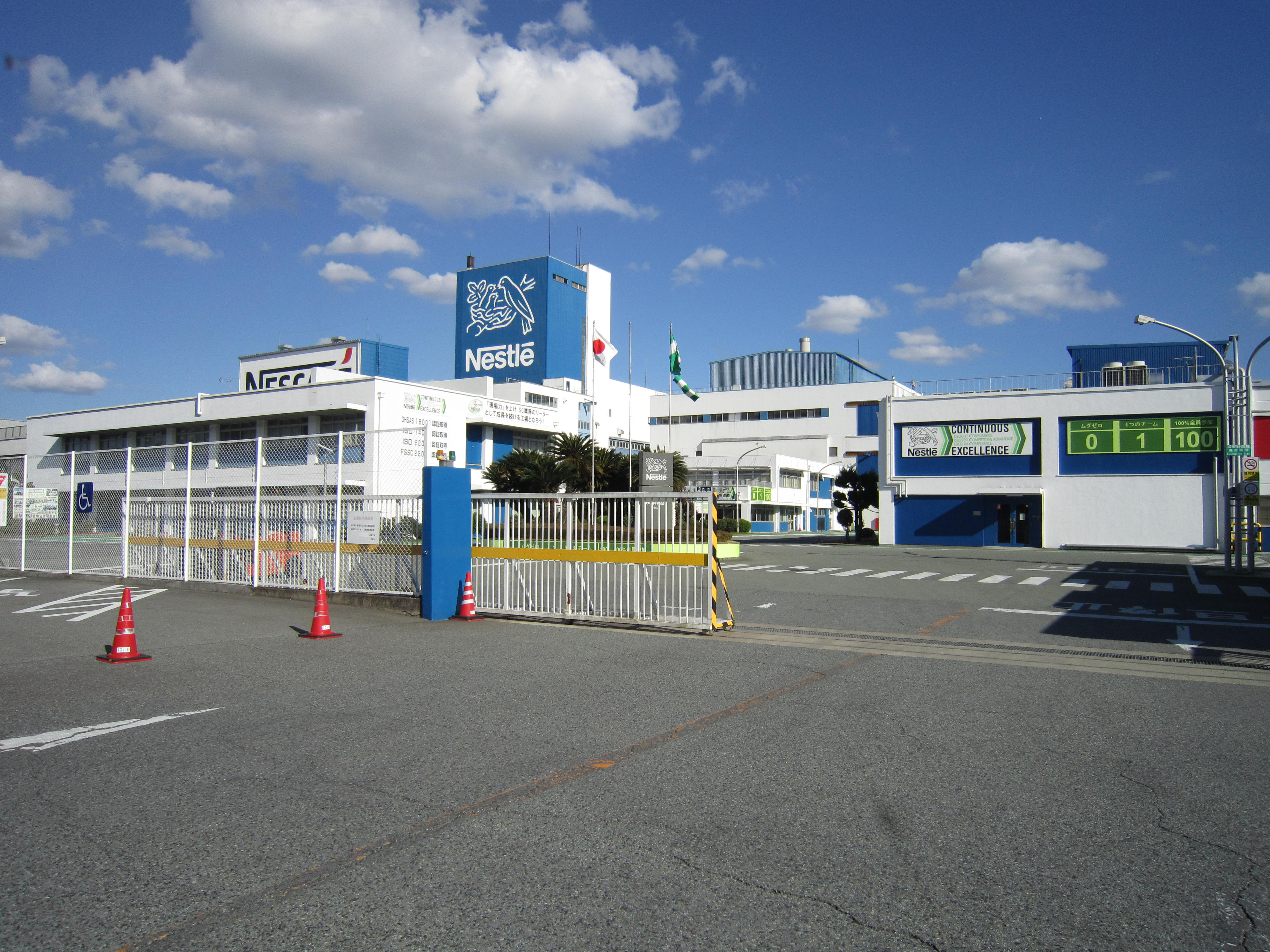 国道312号線に面するネスレ日本姫路工場。